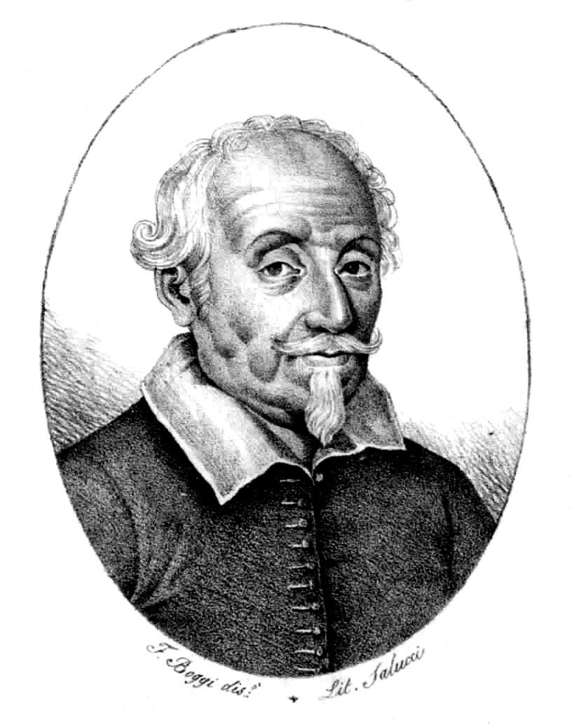 La secchia rapita. Gregorio Chiari, Firenze, 1824.